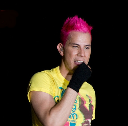 Christian Chávez durante um show em 2008.